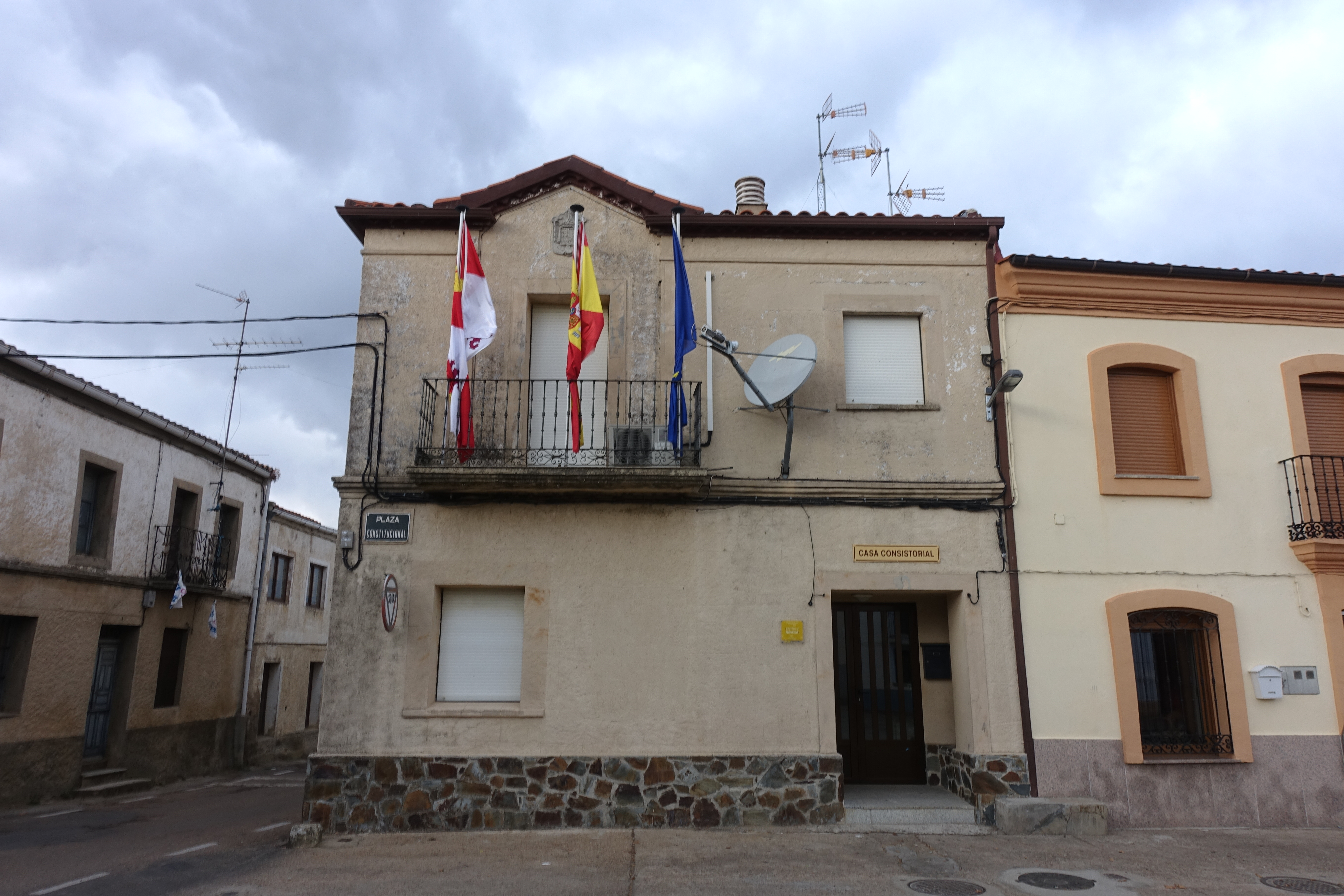 Casa consistorial de Martiago (Salamanca, España).